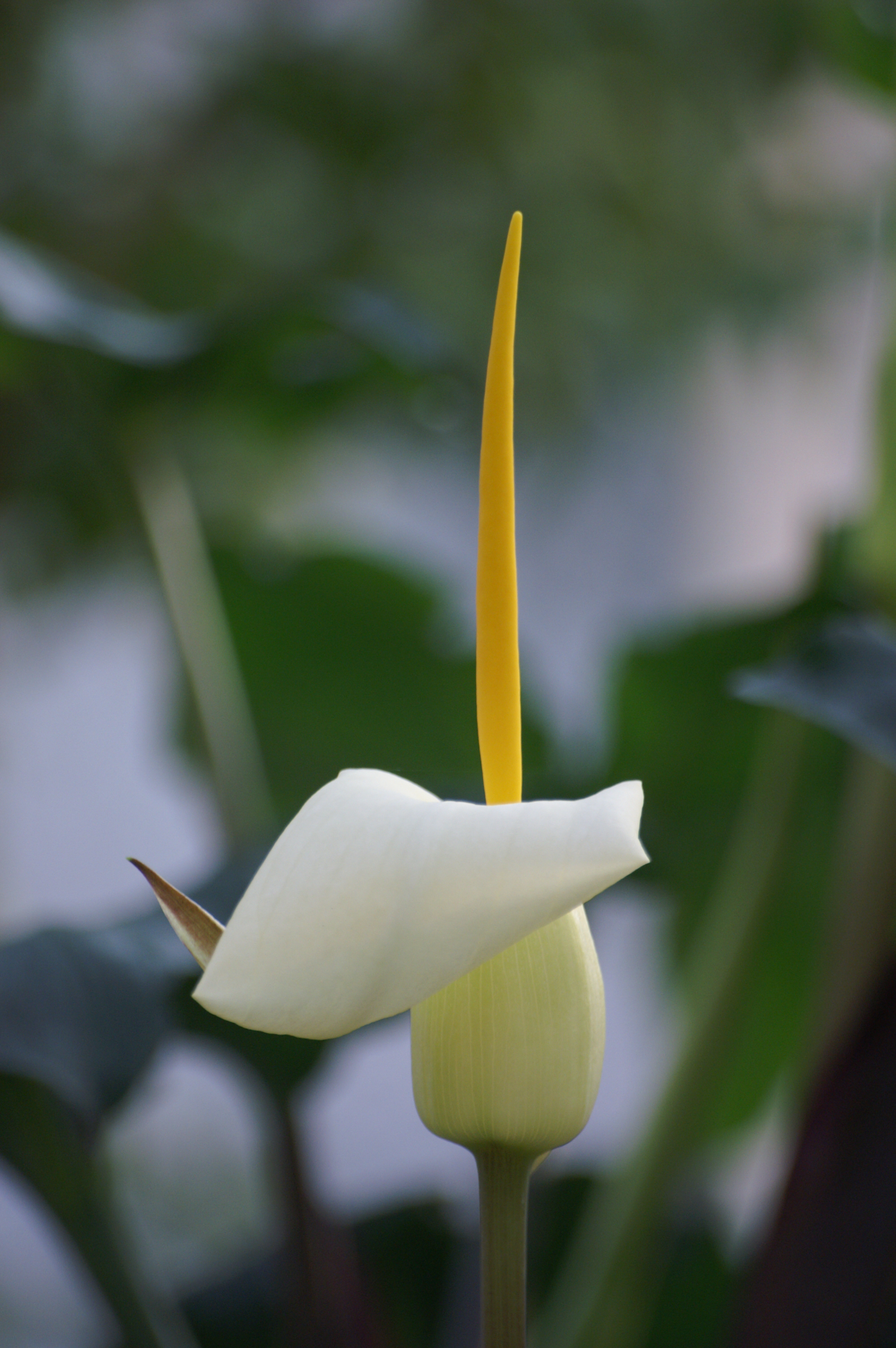 Blüte des Kreta-Aronstabs (Arum creticum) im Botanischen Garten, Berlin.